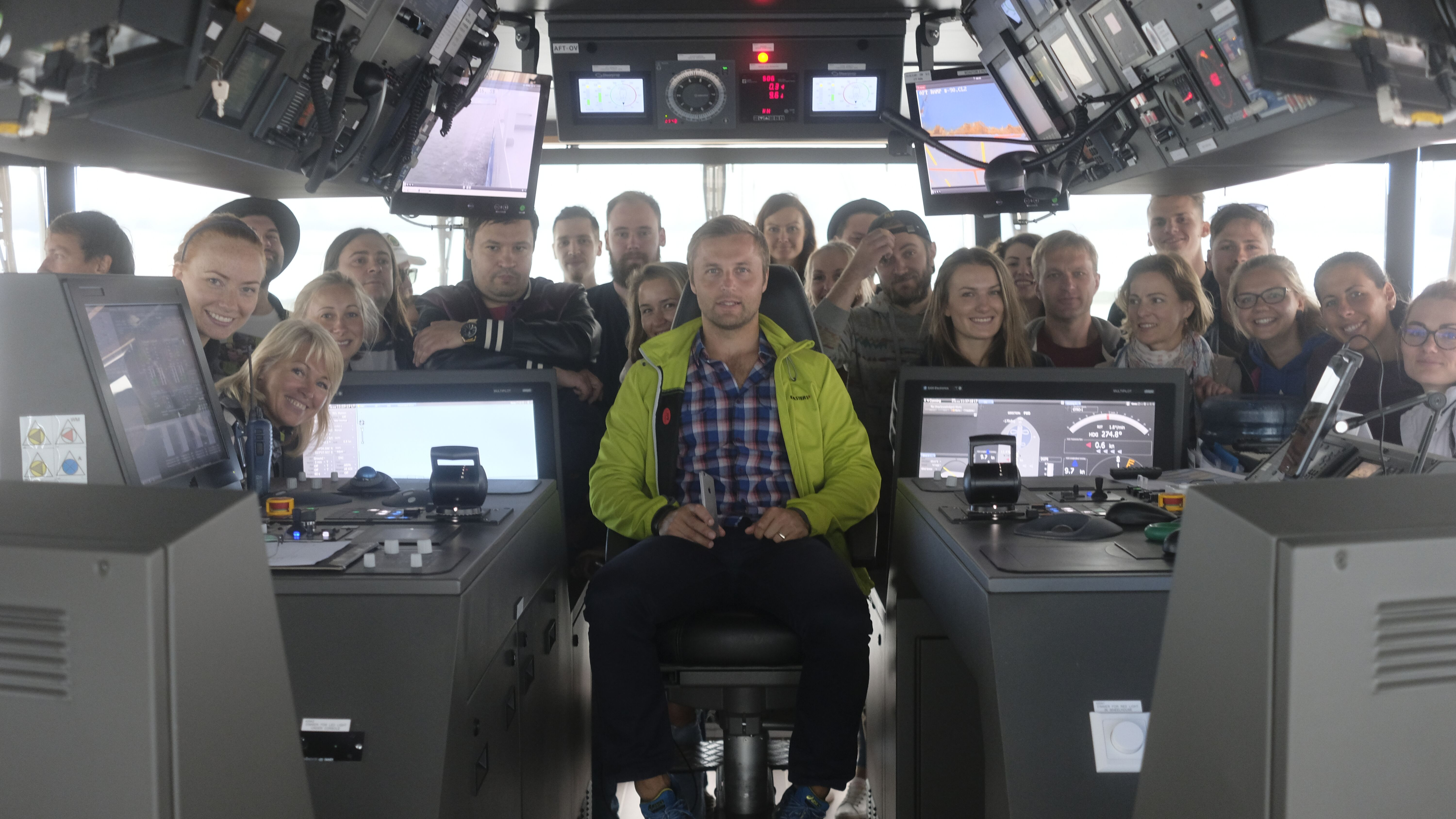 Kapten Loodus